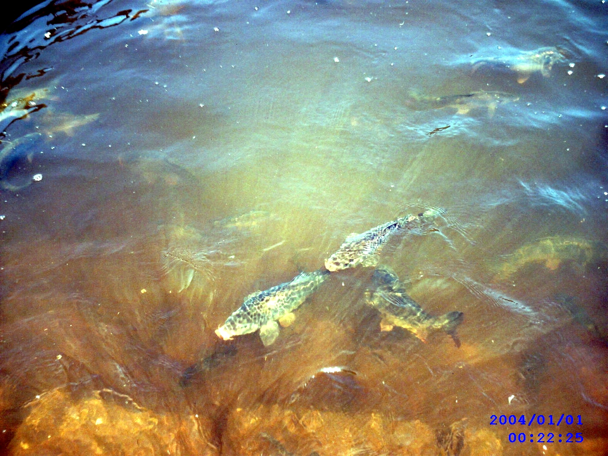 Carpes étang Chardin Fontenoy le Château, Vosges.